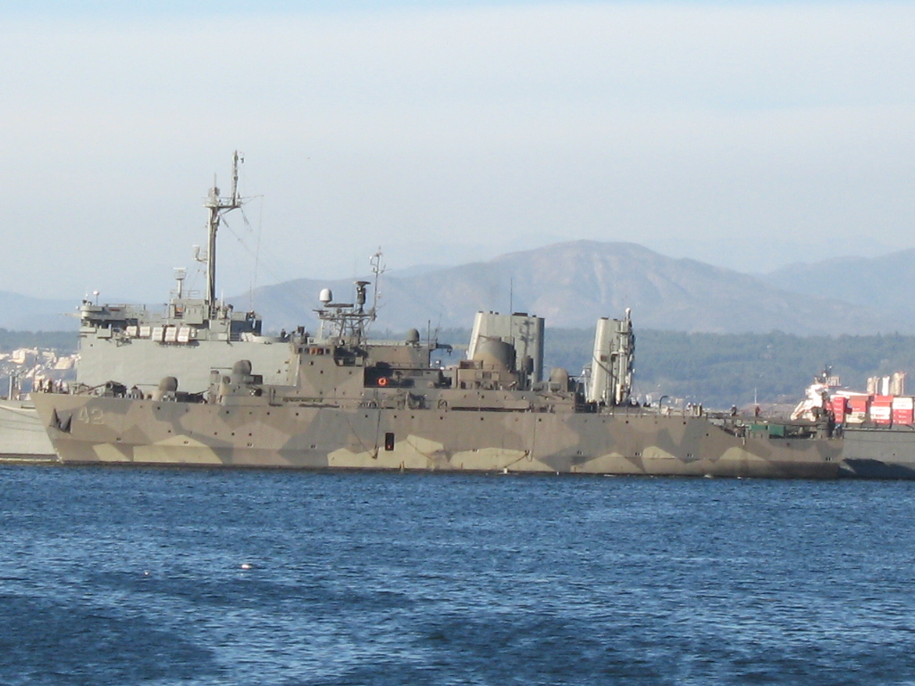 BMS-42 Almirante Merino